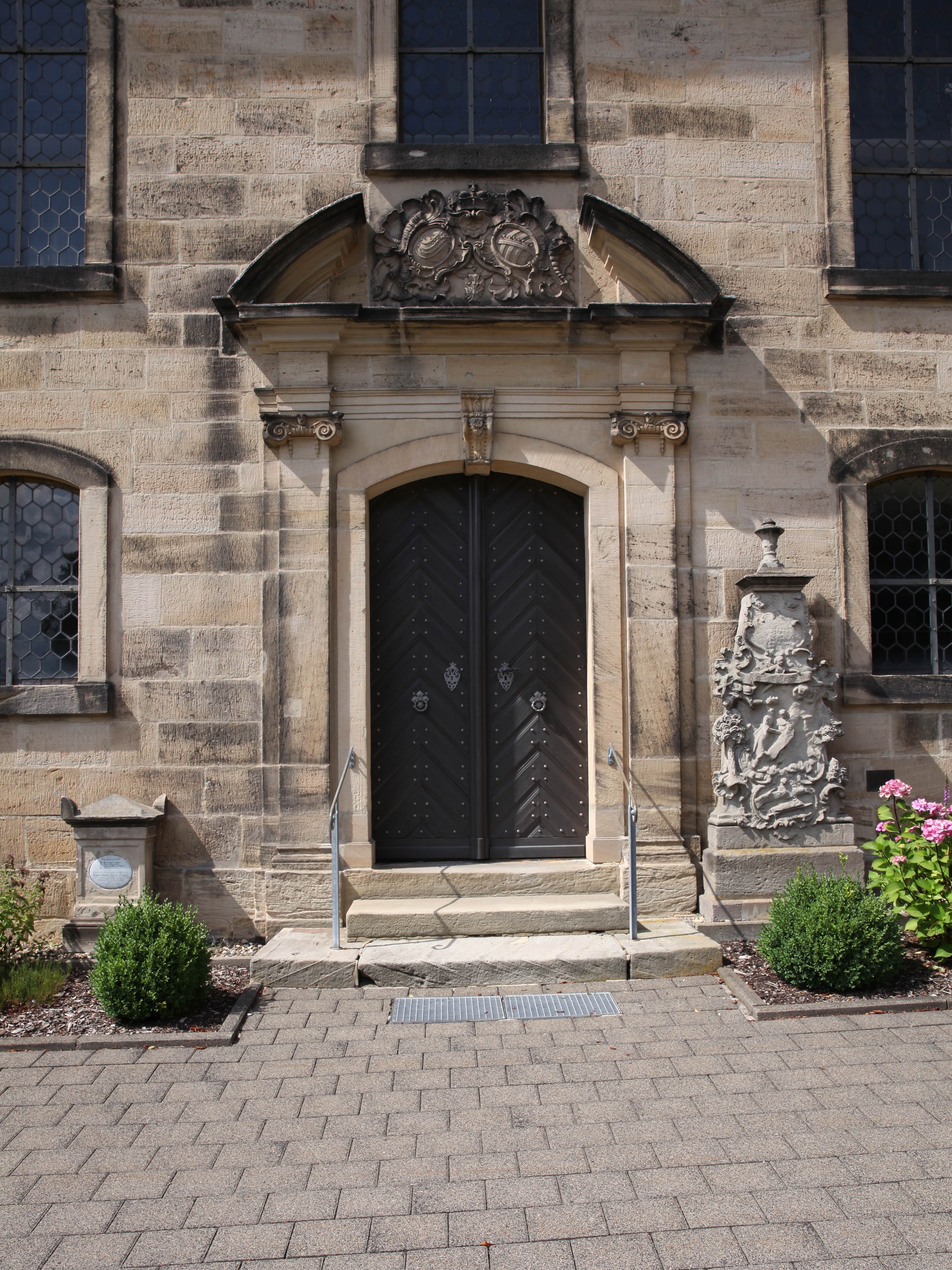 Südportal der Auferstehungskirche, Neustadt bei Coburg